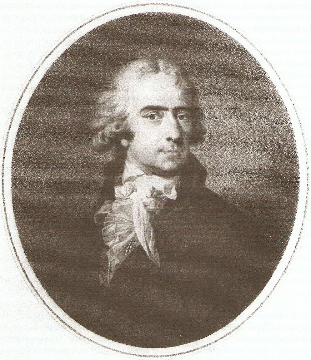 Konstanty Czartoryski - miedzioryt, Fryderyk John, rys. Linder (Linderen) Franz